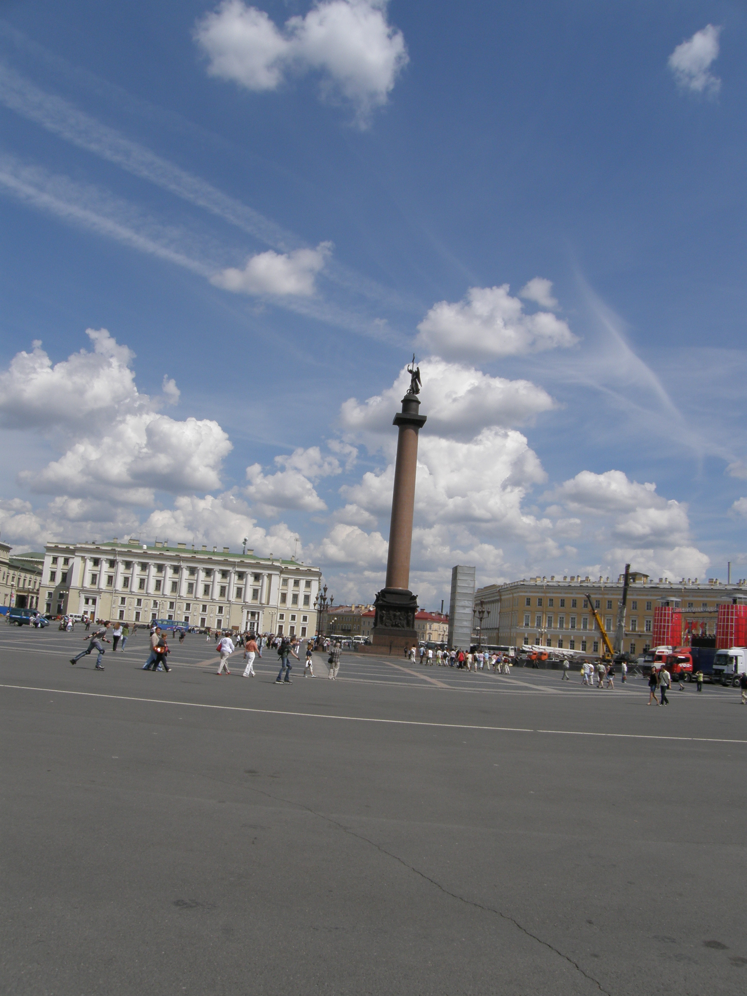 εικόνα από το προαύλιο του μουσείου Ερμιτάζ με τον χαρακτηριστικό οδαλίσκο